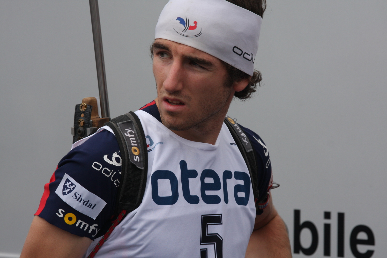 Jean-Guillaume Beatrix under Blinkfestivalen i Sandnes 2009